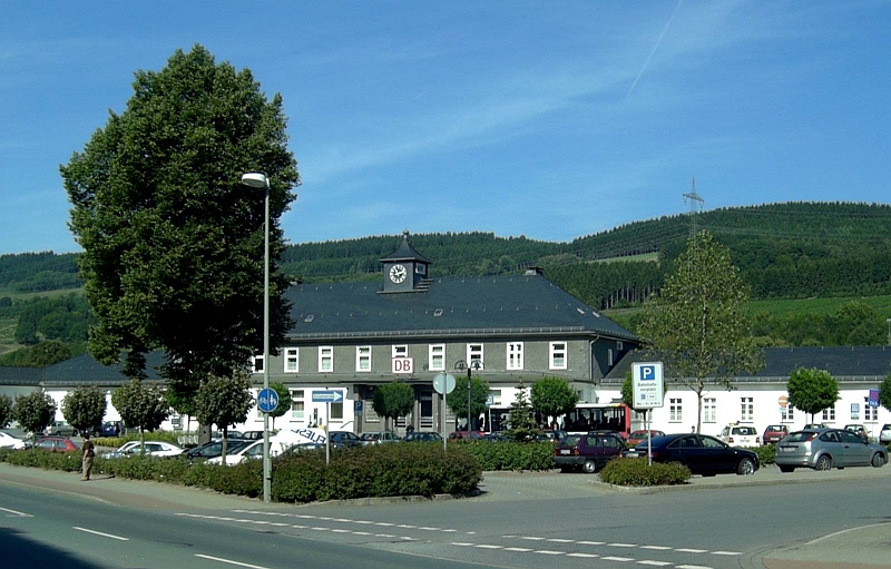 Bestwig, Bahnhof, Germany.